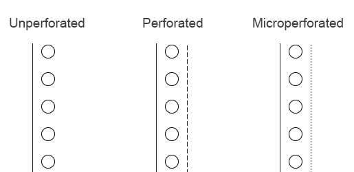 Verschillende types van kettingpapier